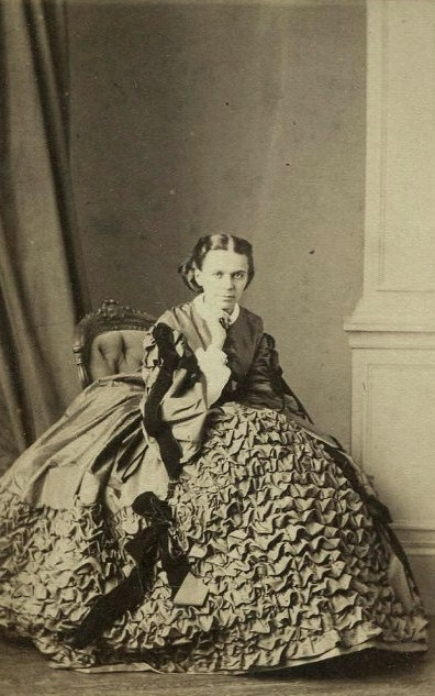 Графиня Александра Ивановна Чернышева-Кругликова (1832—1926), в замужестве Пашкова.